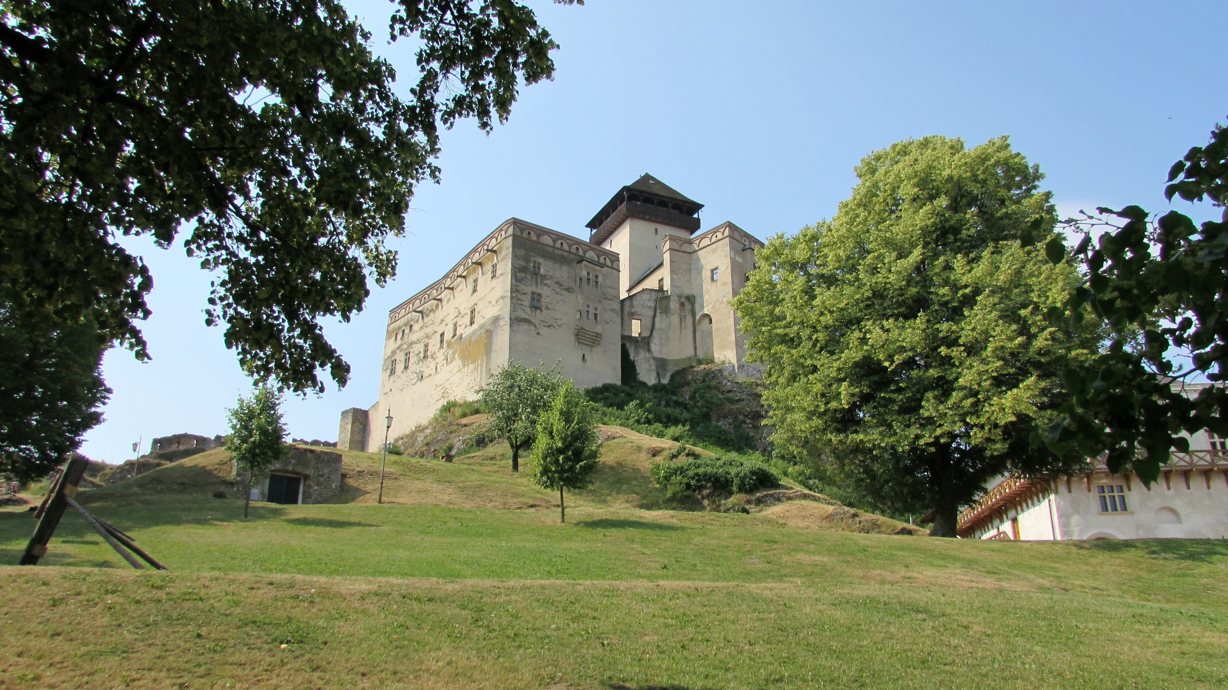 Trencin Ansicht-3